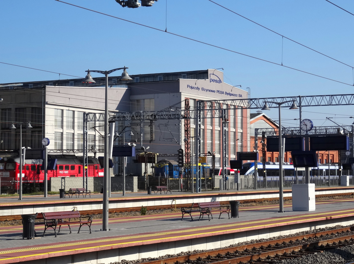 Hala montażowa Pojazdy Szynowe Pesa w Bydgoszczy. Widok z peronu dworca kolejowego Bydgoszcz Główna